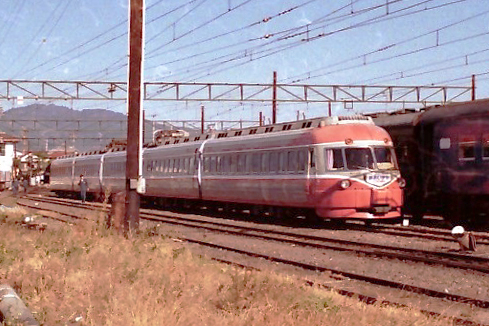 大井川鉄道 (当時) に譲渡された、元小田急電鉄の3000形電車 (5両編成) が、新金谷駅の車庫に留置されている姿。